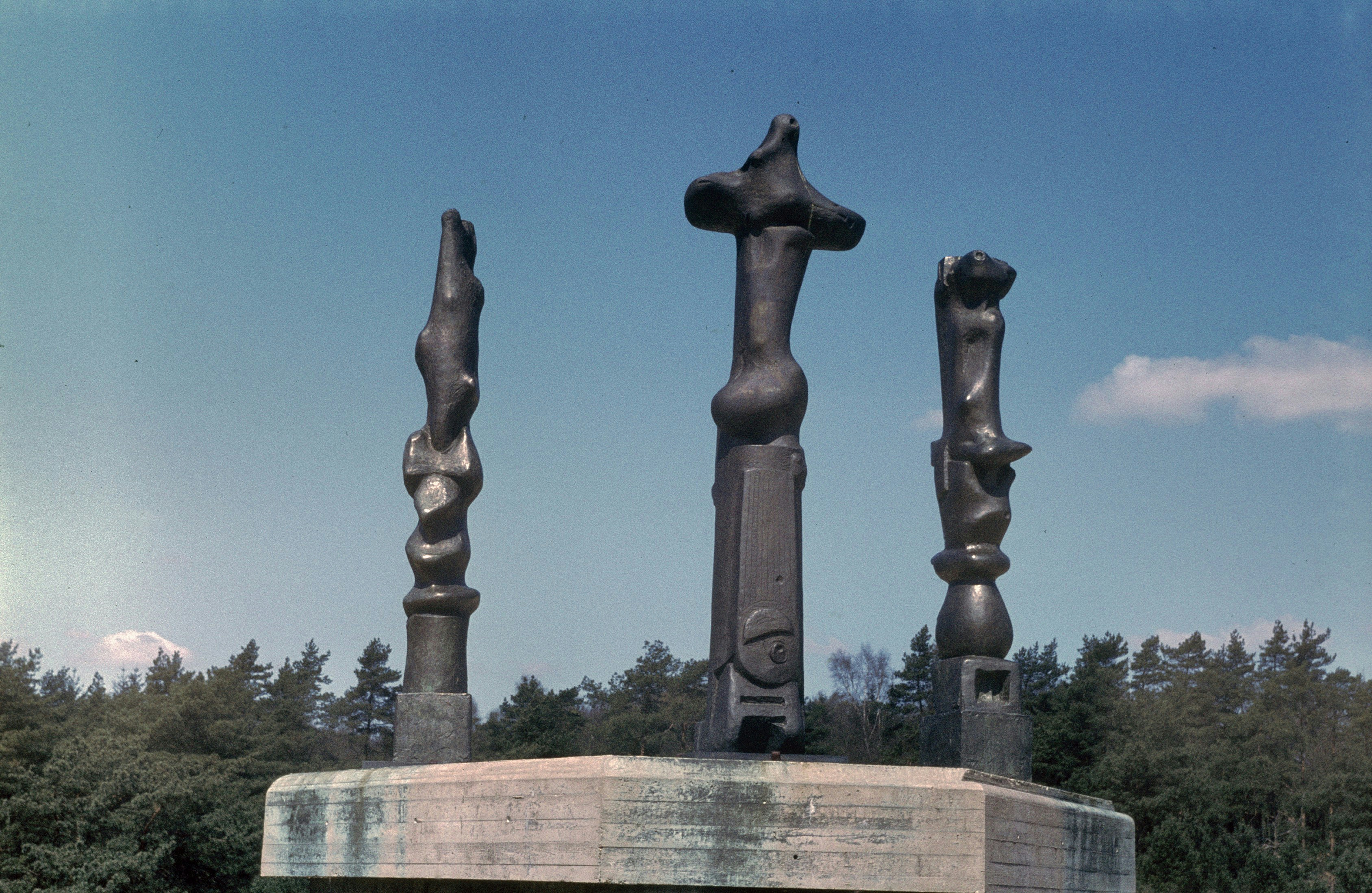 PARK 'DE HOGE VELUWE': Exterieur BEELD ' 3 staande motieven van Henry Moore uit 1955-56